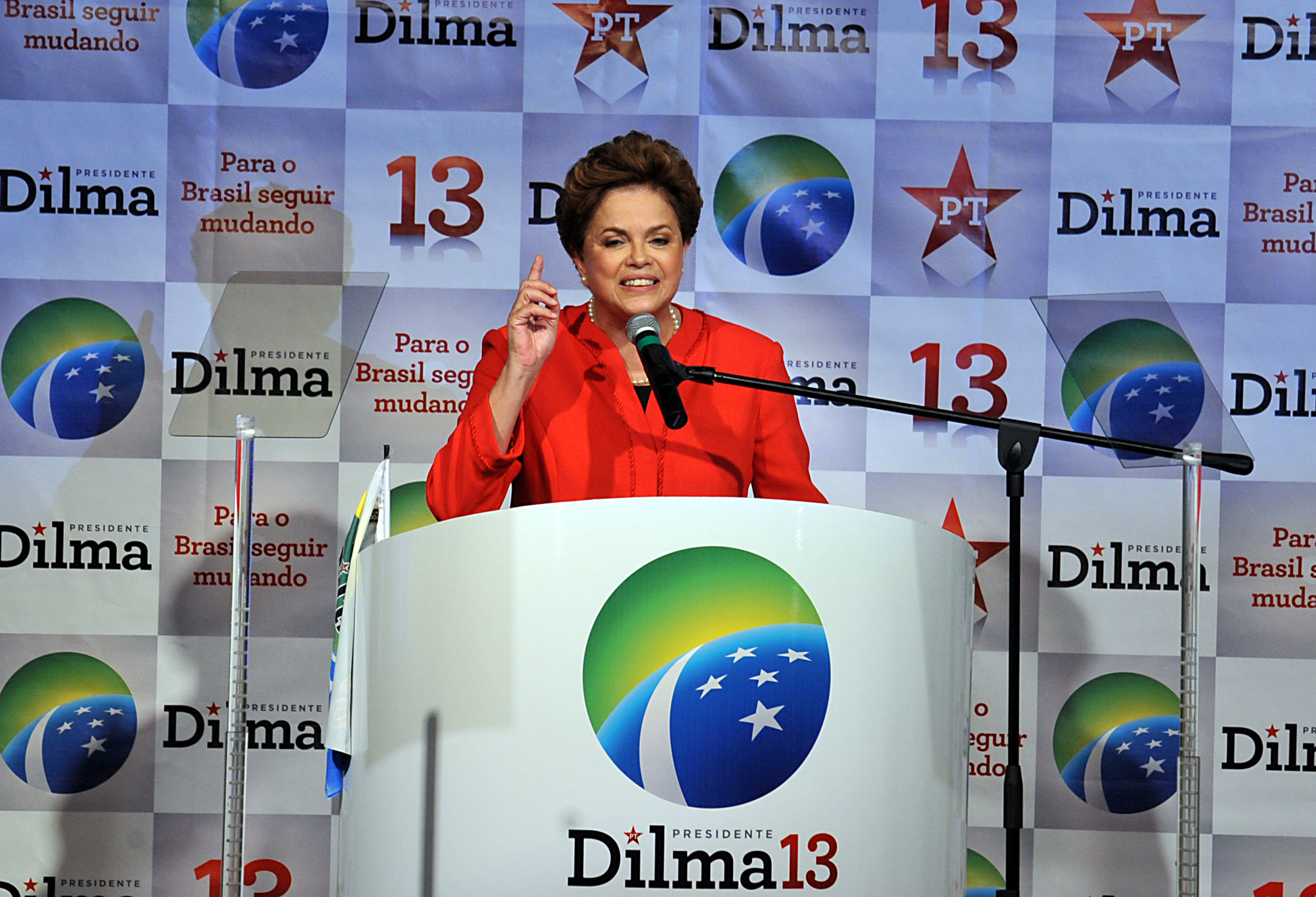 Convenção nacional do PT confirma a candidatura da ex-ministra Dilma Rousseff à Presidência da República e Michel Temer (PMDB) como vice na chapa.